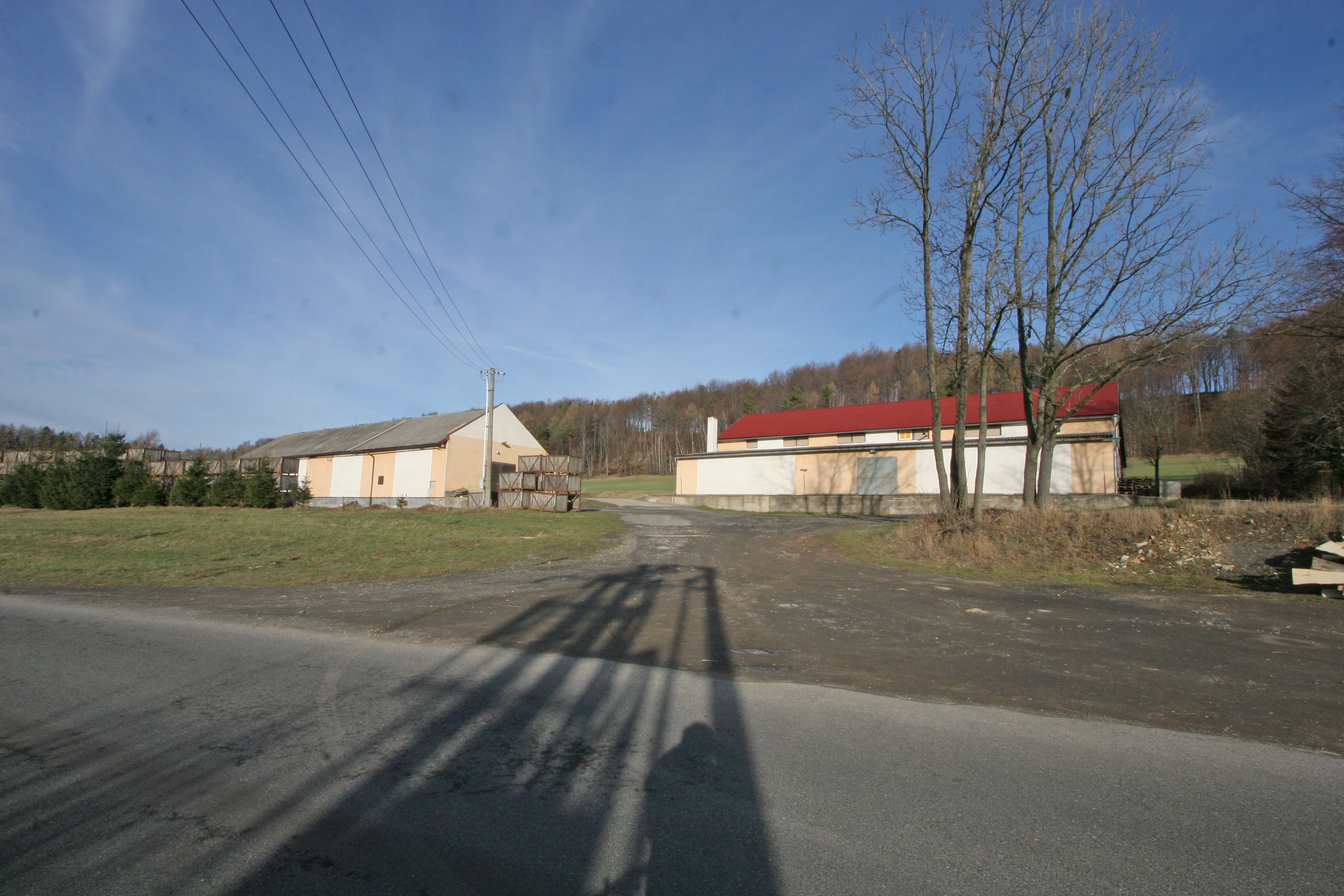 Perálec farma